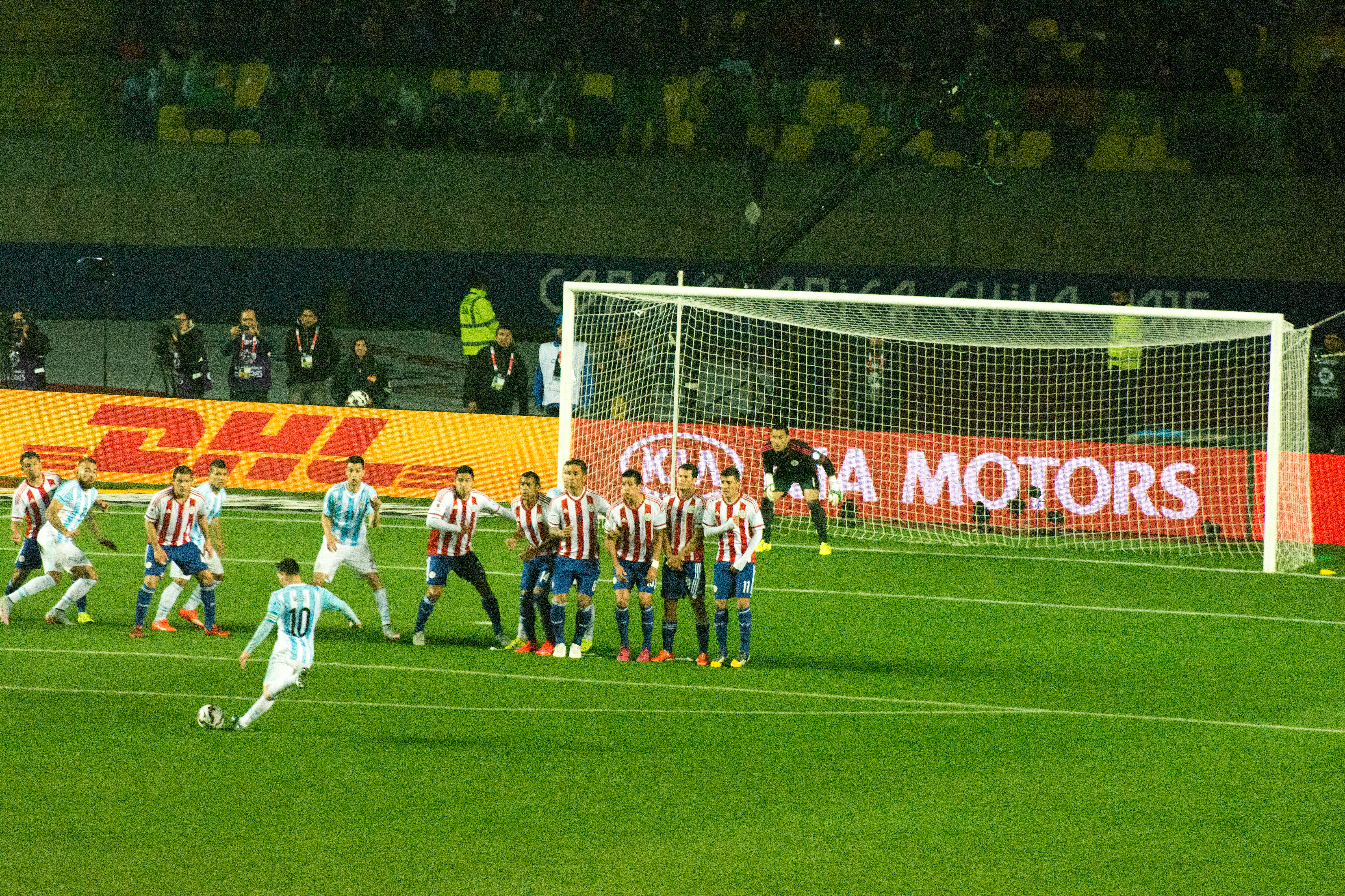 Argentina - Paraguay Copa America Chile 2015 Concepcion